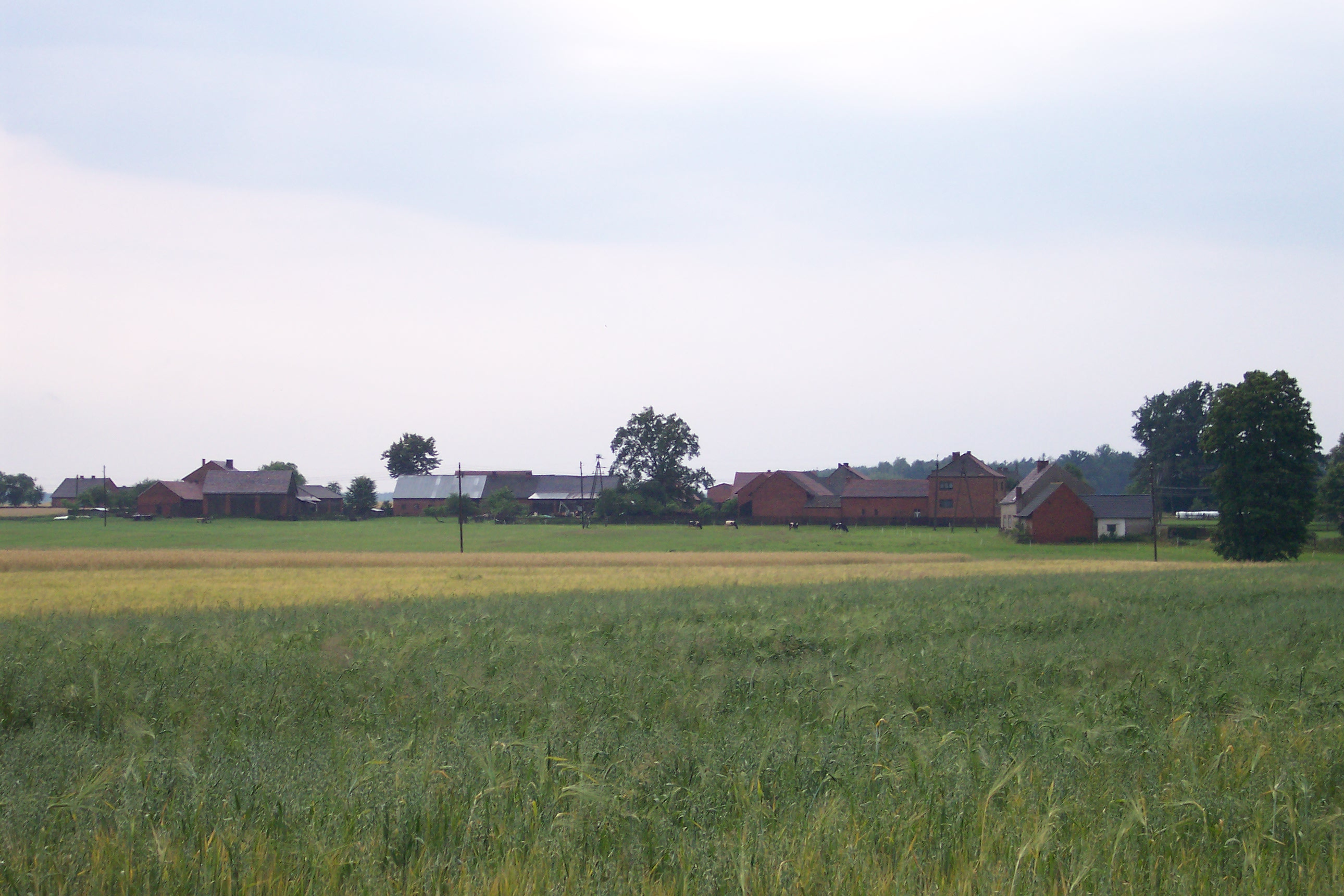 Siedliska (woj. opolskie)